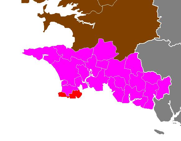 Maps of arrondissements and cantons of France: Arrondissement de Quimper - Canton de Guilvinec.PNG (Département du Finistère , Arrondissement de Quimper)